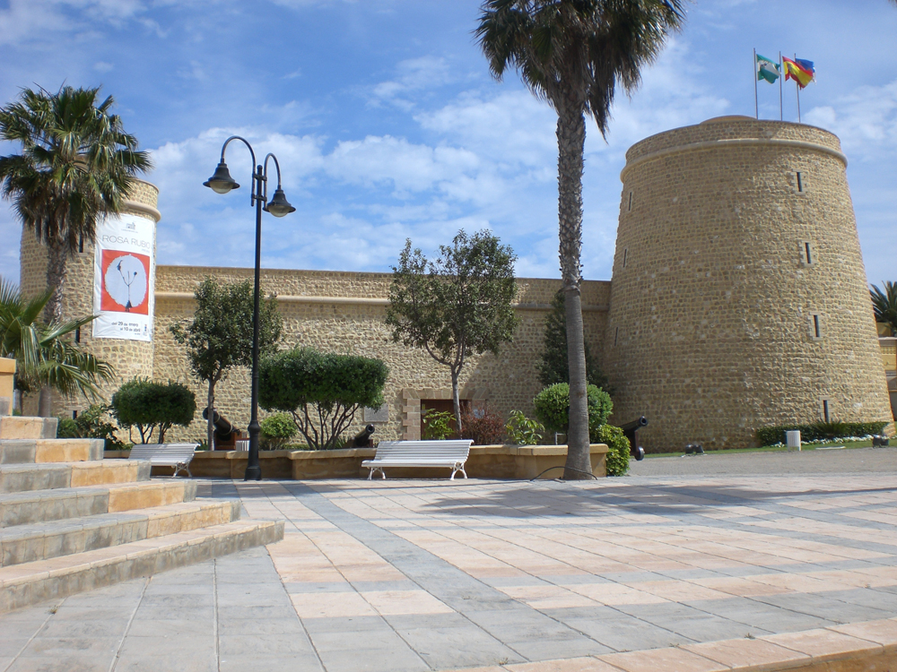 Fortificación de entre finales del siglo XVI y siglo XVII próxima al puerto de Roquetas de Mar (Almería)